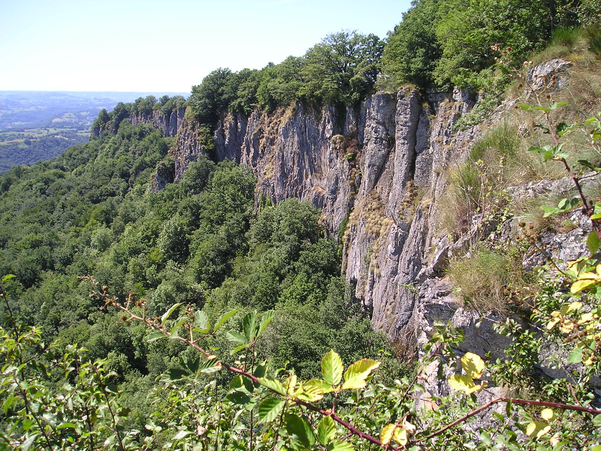 Bort-les-Orgues,_Colline_de_Orgues